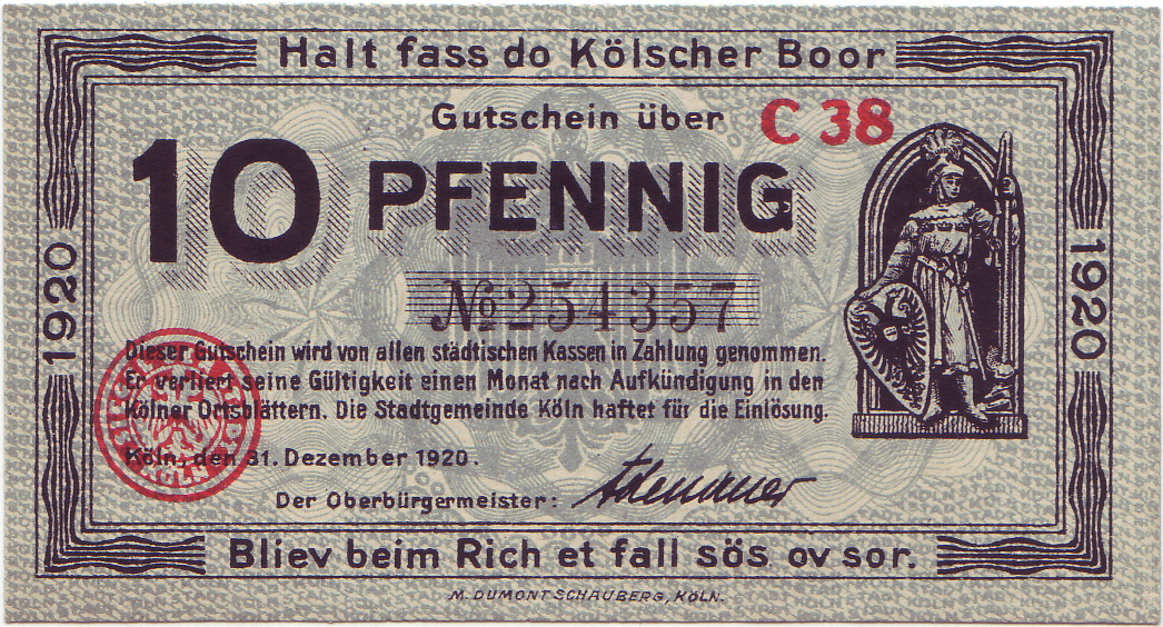 10 Pfennig, 1920, Köln, signed by the major of cologne Konrad Adenauer, front, size:47mm x 88mm Inschrift: Halt fass do Kölscher Boor. Bliev beim Rich et fall sös ov sor. (hochdeutsch: „Halt fest, du Kölner Bauer, bleib beim Reich, es falle (komme) süß oder sauer.“ (auch Inschrift an der Eigelsteintorburg)